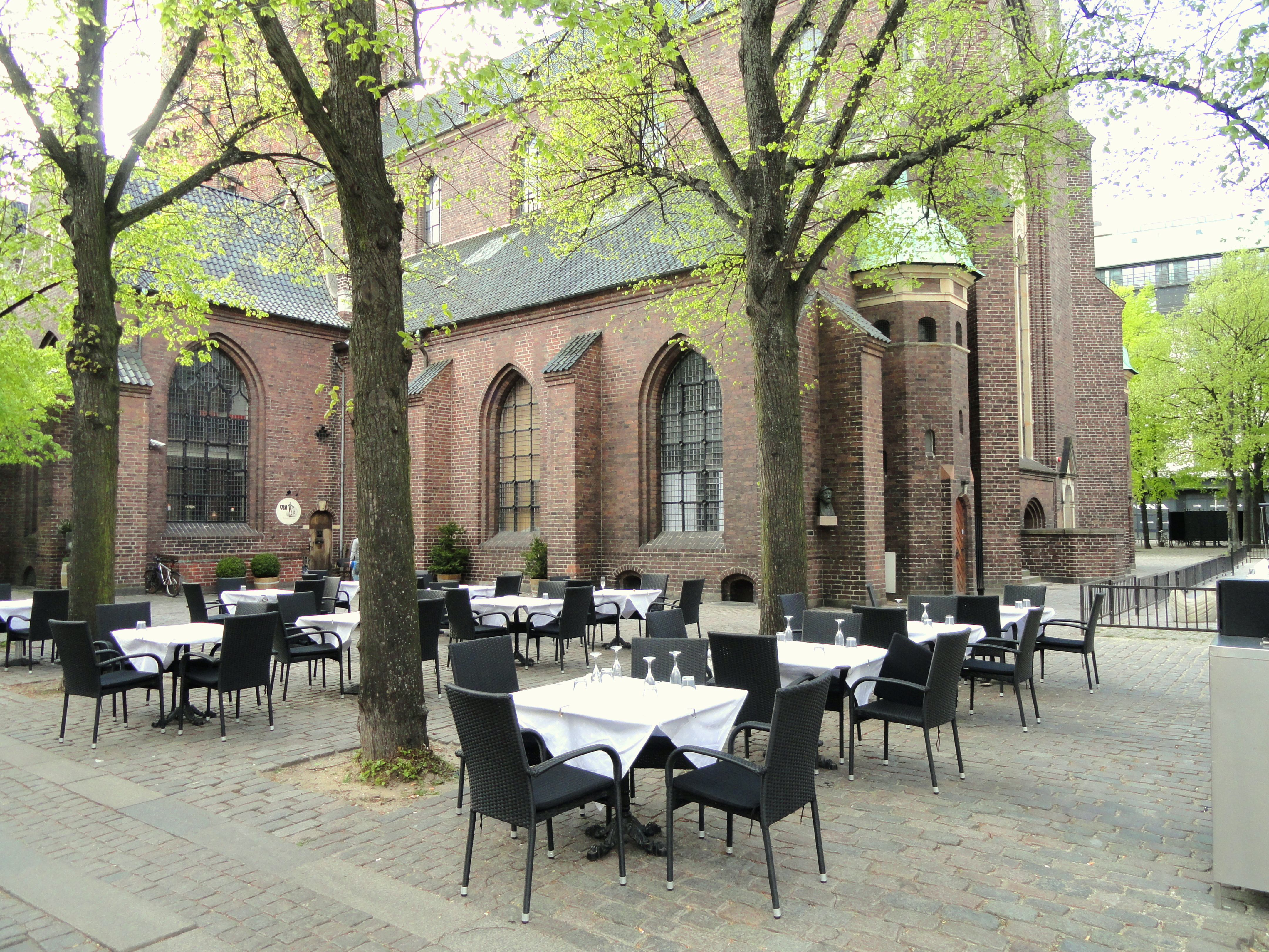 Sankt Nicolai Kirke, Copenhagen, Denmark.